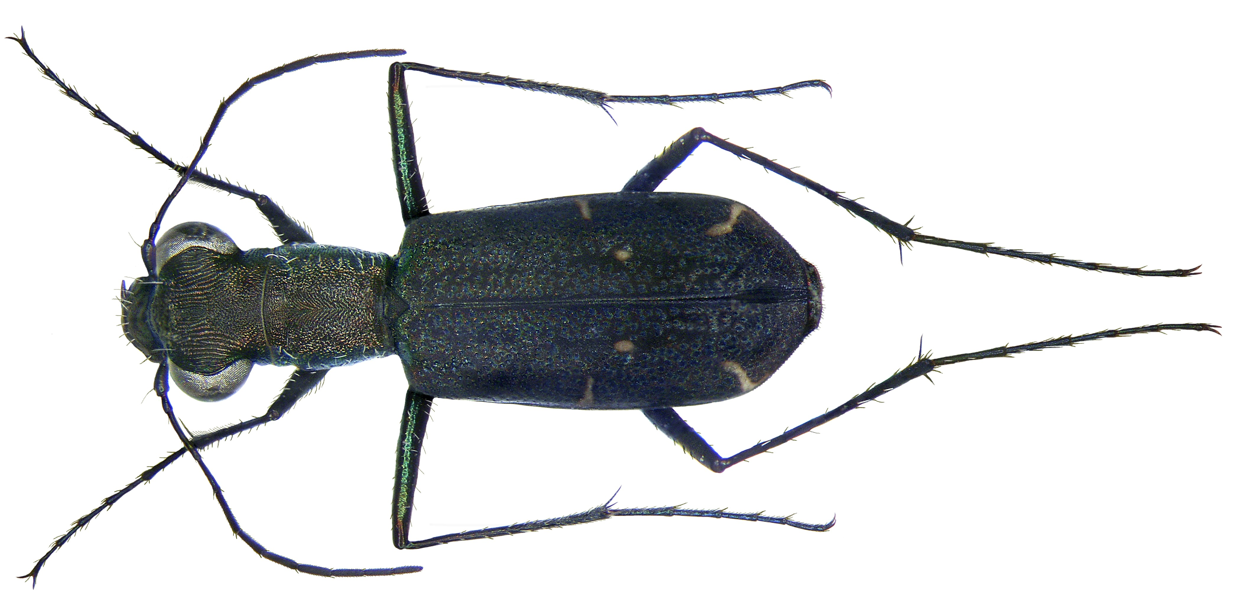 Familie: Carabidae Größe: 11 mm Fundort: Thailand, Andamanen-See, Ko Phin leg. A.Skale, 2007; det. J.Gebert, 2008 Foto: U.Schmidt, 2008